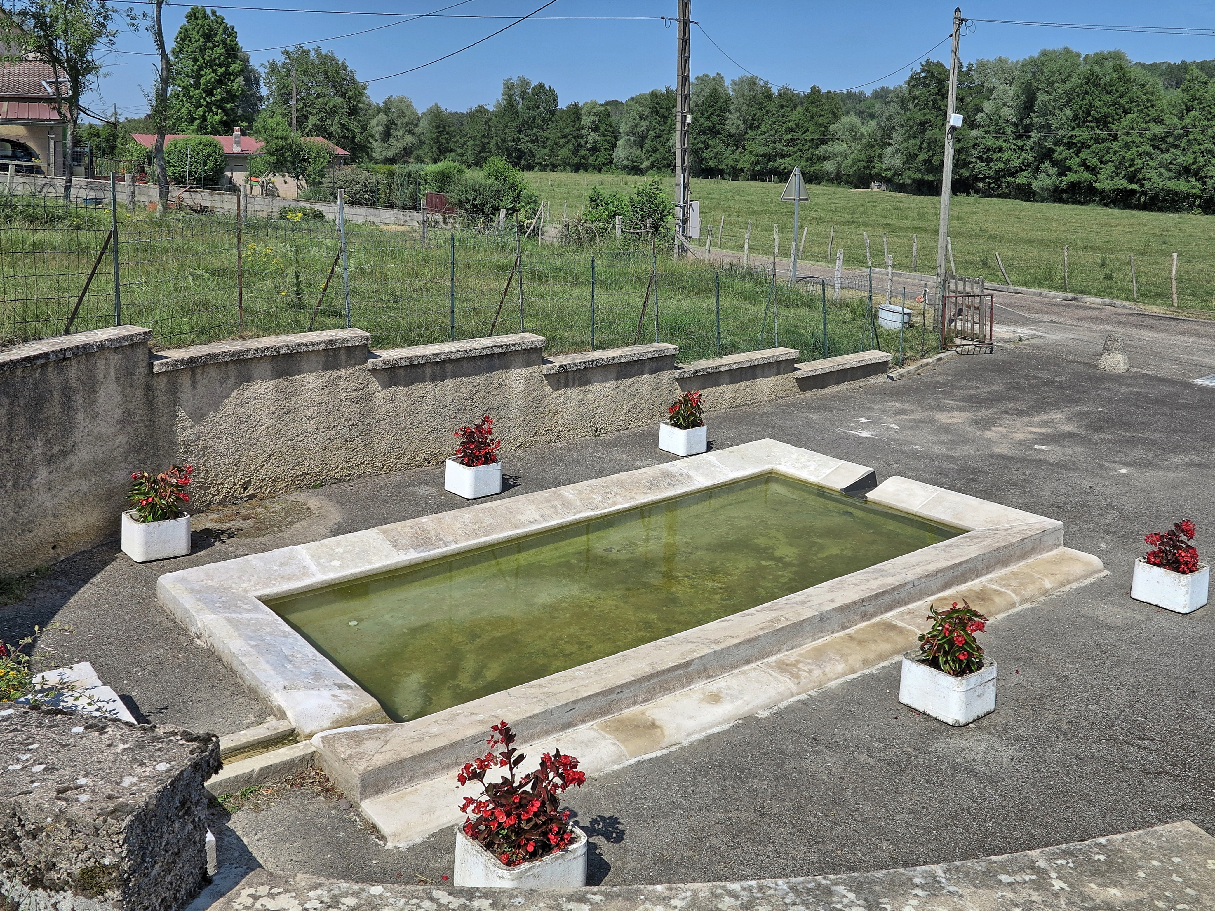 Le lavoir de Sept Fontaines